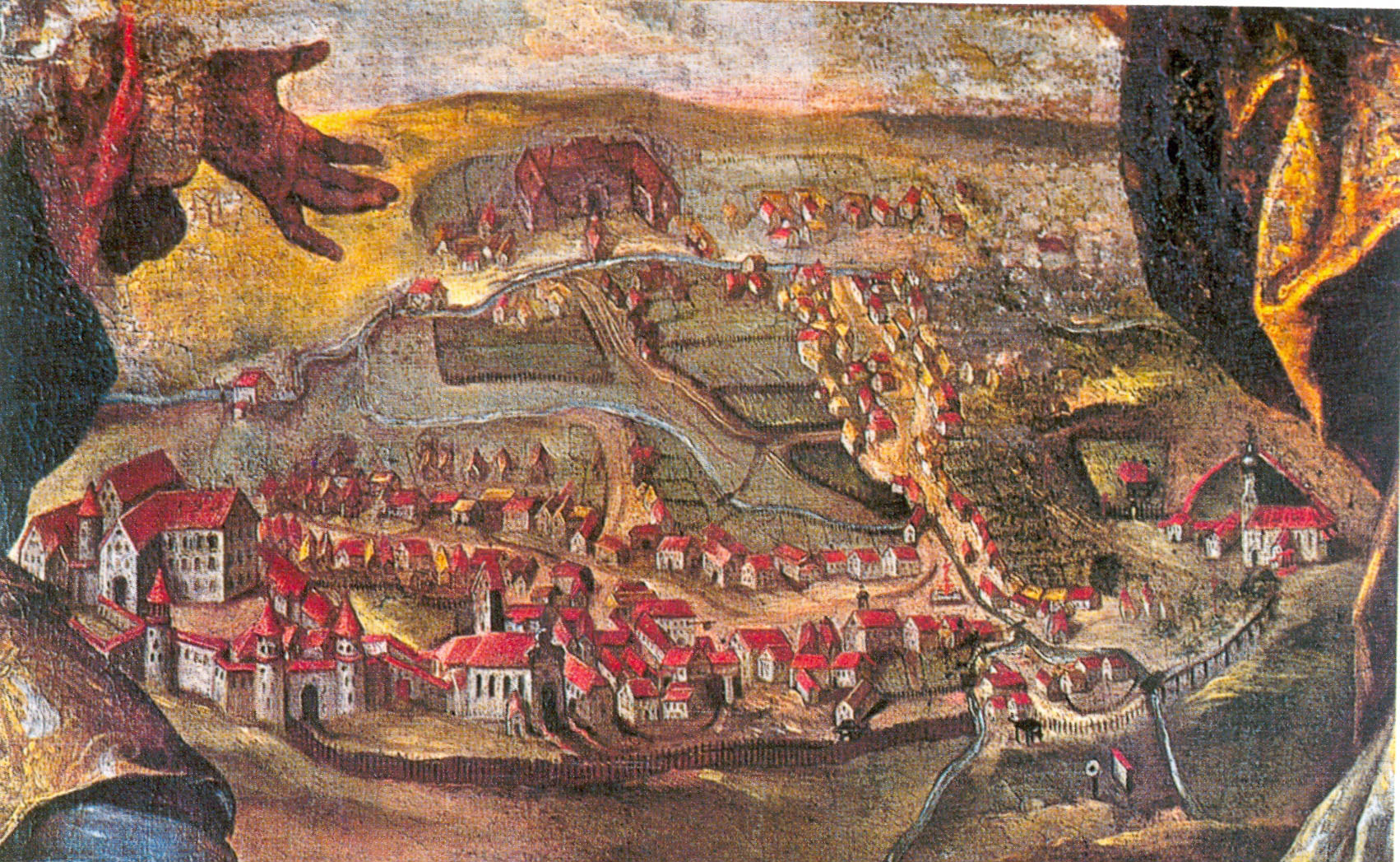 Laupheim Links Schloss Großlaupheim Oben Schloss Kleinlaupheim Ausschnitt aus einem Altarbild des Hochaltars der Kapelle St. Leonhard